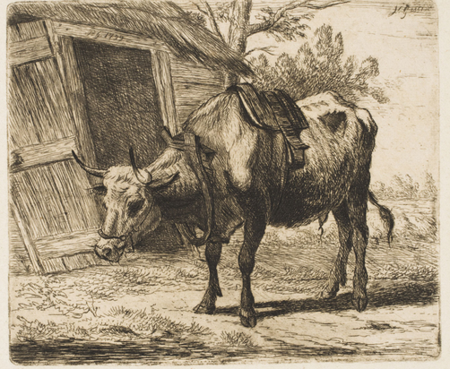 gesatteltes Rind